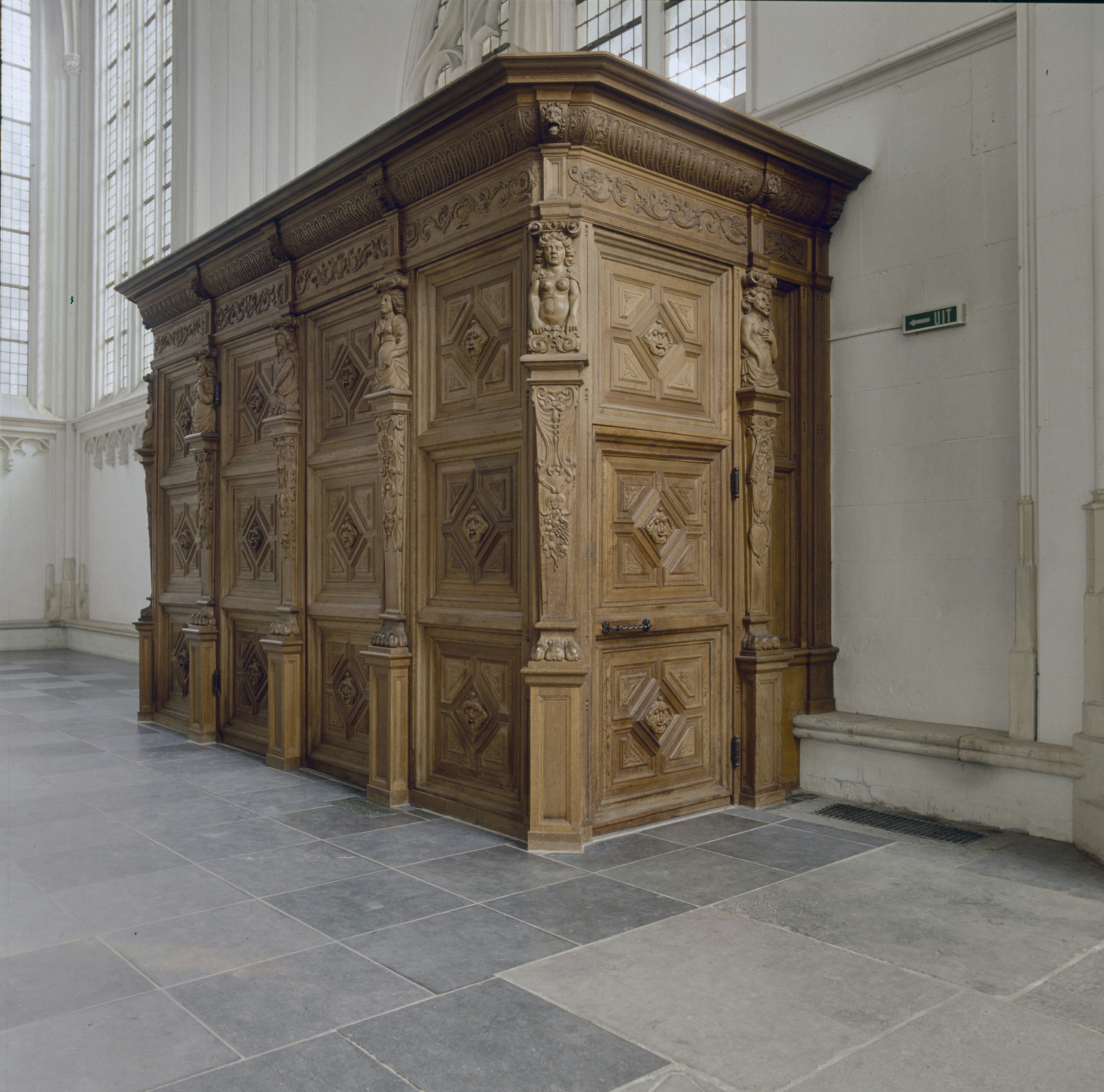 Hervormde Stevenskerk: Interieur, overzicht van het tochtportaal